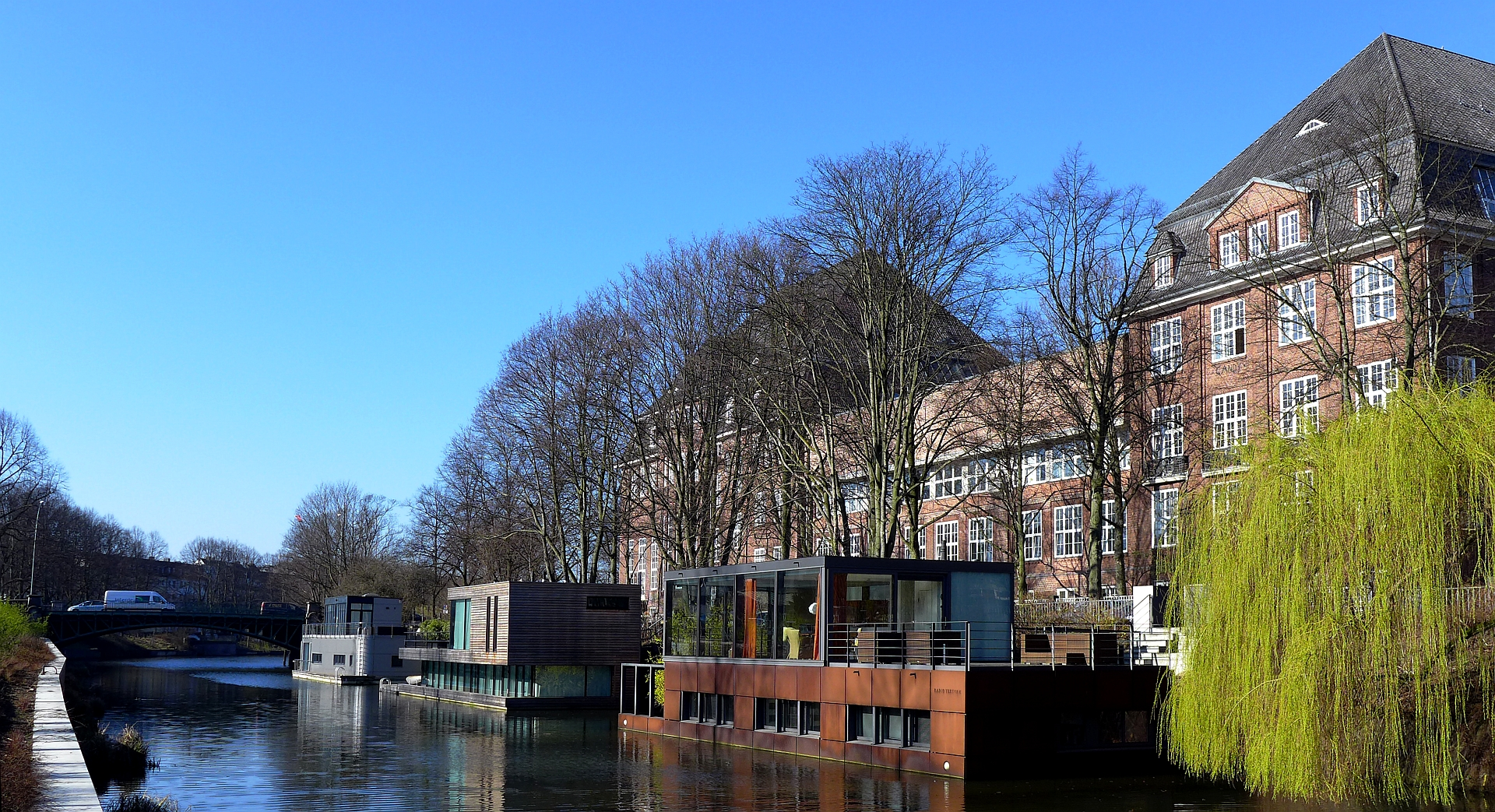 Eilbekkanal mit Hausbooten im März 2014. Im Bildhintergrund die Hochschule für bildende Künste Hamburg.